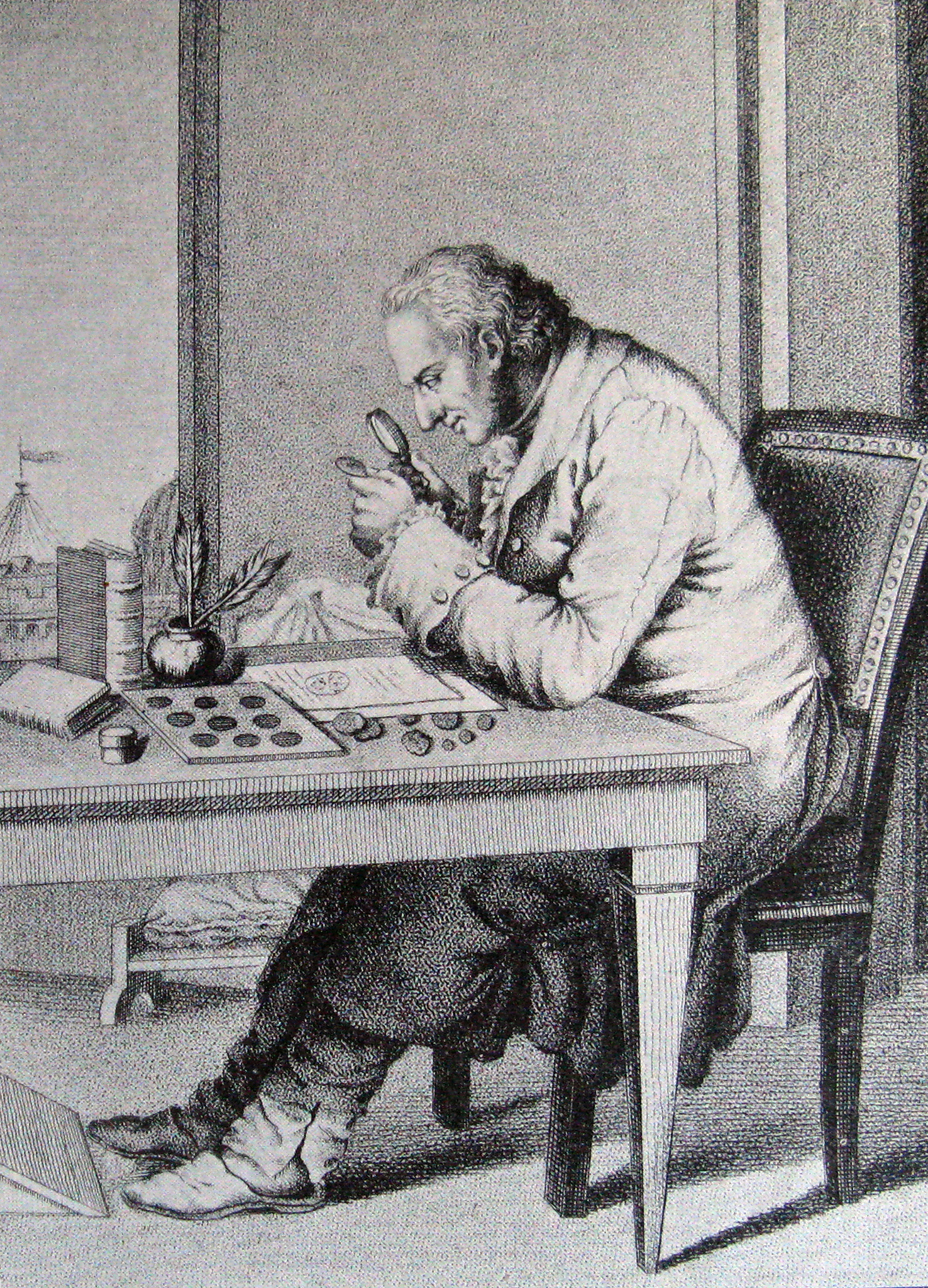 Georg (Jørgen) Zoega (20. december 1755 i Daler i Sønderjylland – 10. februar 1809 i Rom) var arkæolog og numismatiker